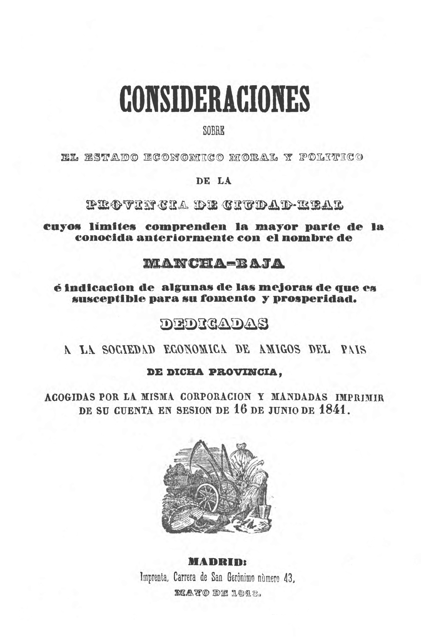 Portada del libro "Consideraciones sobre el estado económico, moral y político de la provincia de Ciudad Real", de Diego Medrano y Treviño.